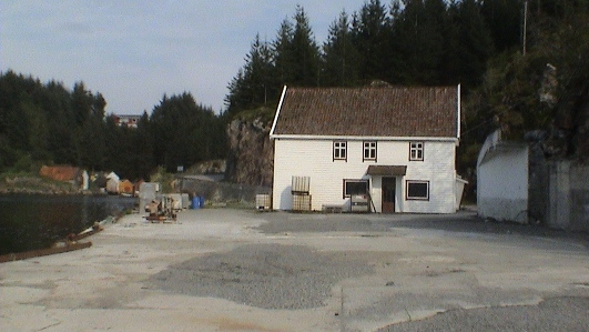 Bilete av Øklandsvågen, Økland, Bømlo kommune. Tatt 9. mai 2004 av Marius Økland.